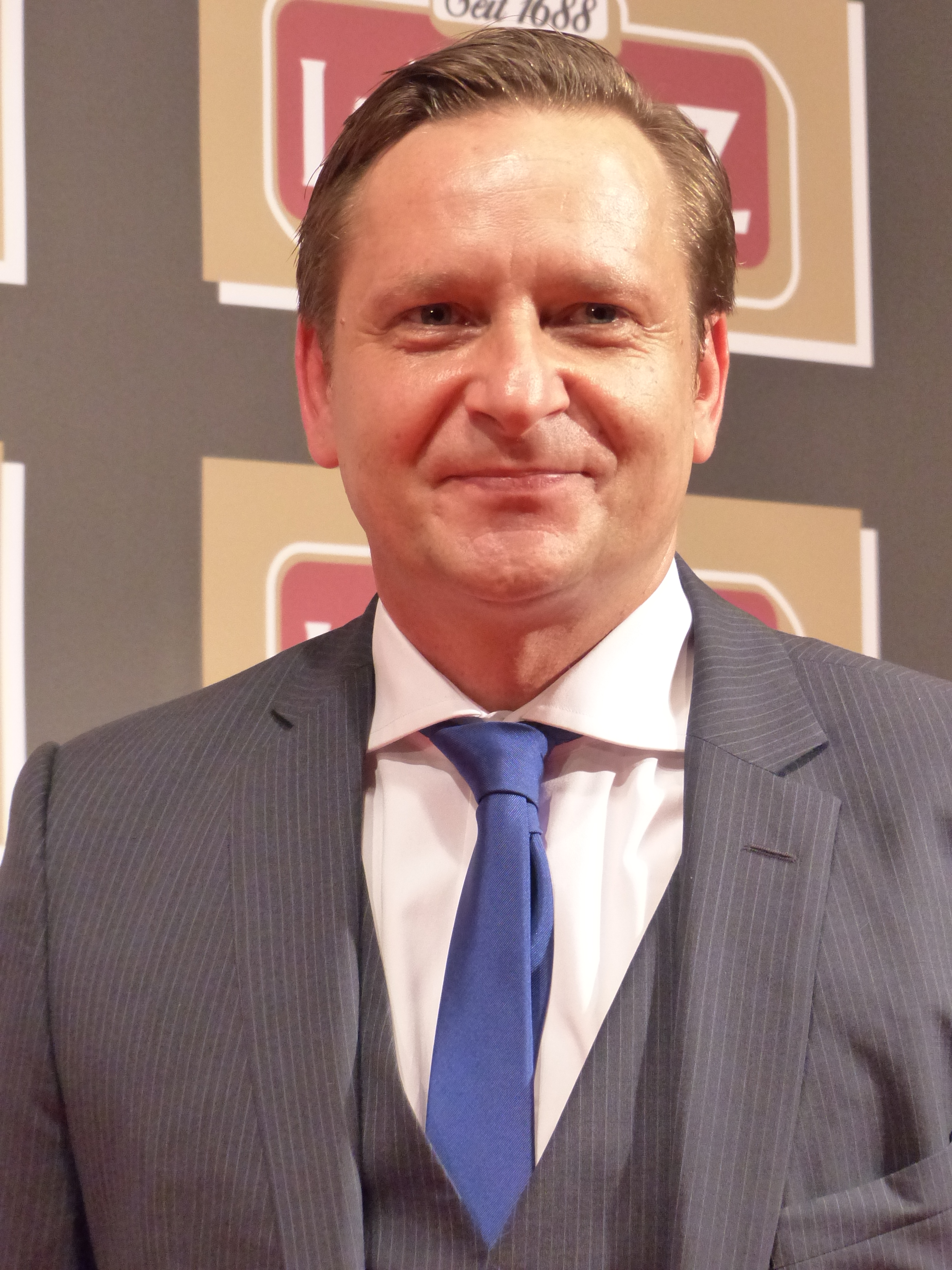 Horst Heldt bei der Lambertz Monday Night, im Februar 2016.